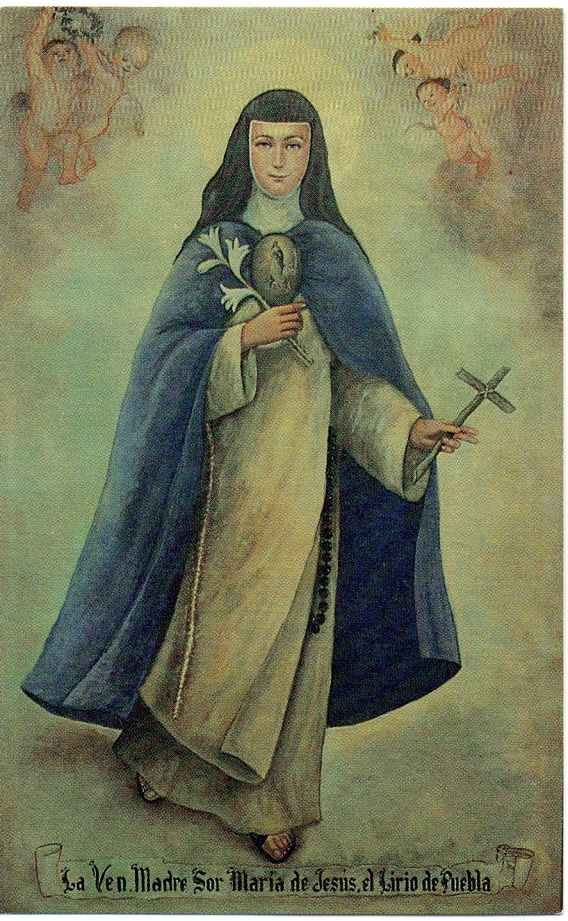 Lirio De Puebla, OIC - Federación Santa Mª de Gpe - Monasterio de la Inmaculada Concepción de la Puebla de los Ángeles